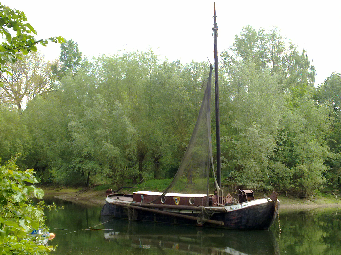 Historischer Aalschokker Maria Theresia (1893), vor der Siegmündung in den Rhein